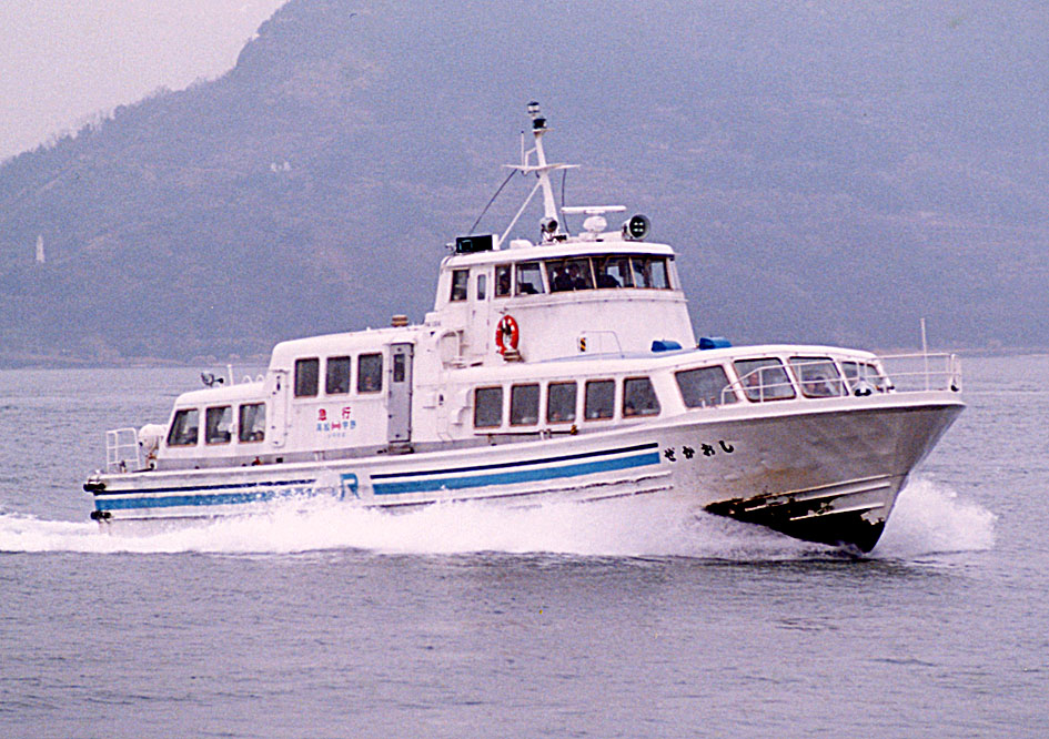 JR四国 宇高連絡船 急行便 高速艇 しおかぜ